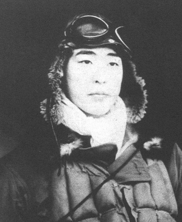 1942年6月、空母「隼鷹」乗組み時撮影。